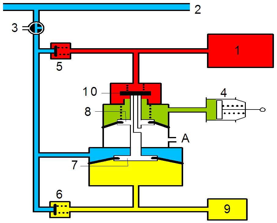 Steuerventil: Bremsen 1 Hilfsluftbehälter 2 Hauptleitung 3 Ausschalthahn 4 Bremszylinder 5 Rückschlagventil 6 Rückschlagventil 7 Steuerkolben 8 Regulierkolben 9 Steuerbehälter 10 Einlassventil A Luftauslass ins Freie Eine Druckverminderung in der Hauptleitung bewirkt eine Abnahme des Drucks im Raum (blau) über dem Steuerkolben 7. Gleichzeitig schließen die Rückschlagventile 5 und 6. Somit kann weder aus dem Hilfsluftbehälter noch aus dem Steuerbehälter Druckluft in die Hauptleitung zurückströmen. Infolge des Druckunterschieds zwischen der Steuerluft (gelb) und der Hauptleitungsluft (blau) hebt sich der Steuerkolben, dessen Stößel das Einlassventil von seinem Sitz abhebt und öffnet. Die Verbindung des Bremszylinders 4 durch die Bohrung des Ventilstößels ist geschlossen und aus dem Hilfsluftbehälter strömt Druckluft (grün) durch das geöffnete Einlassventil 10 in den Bremszylinder.